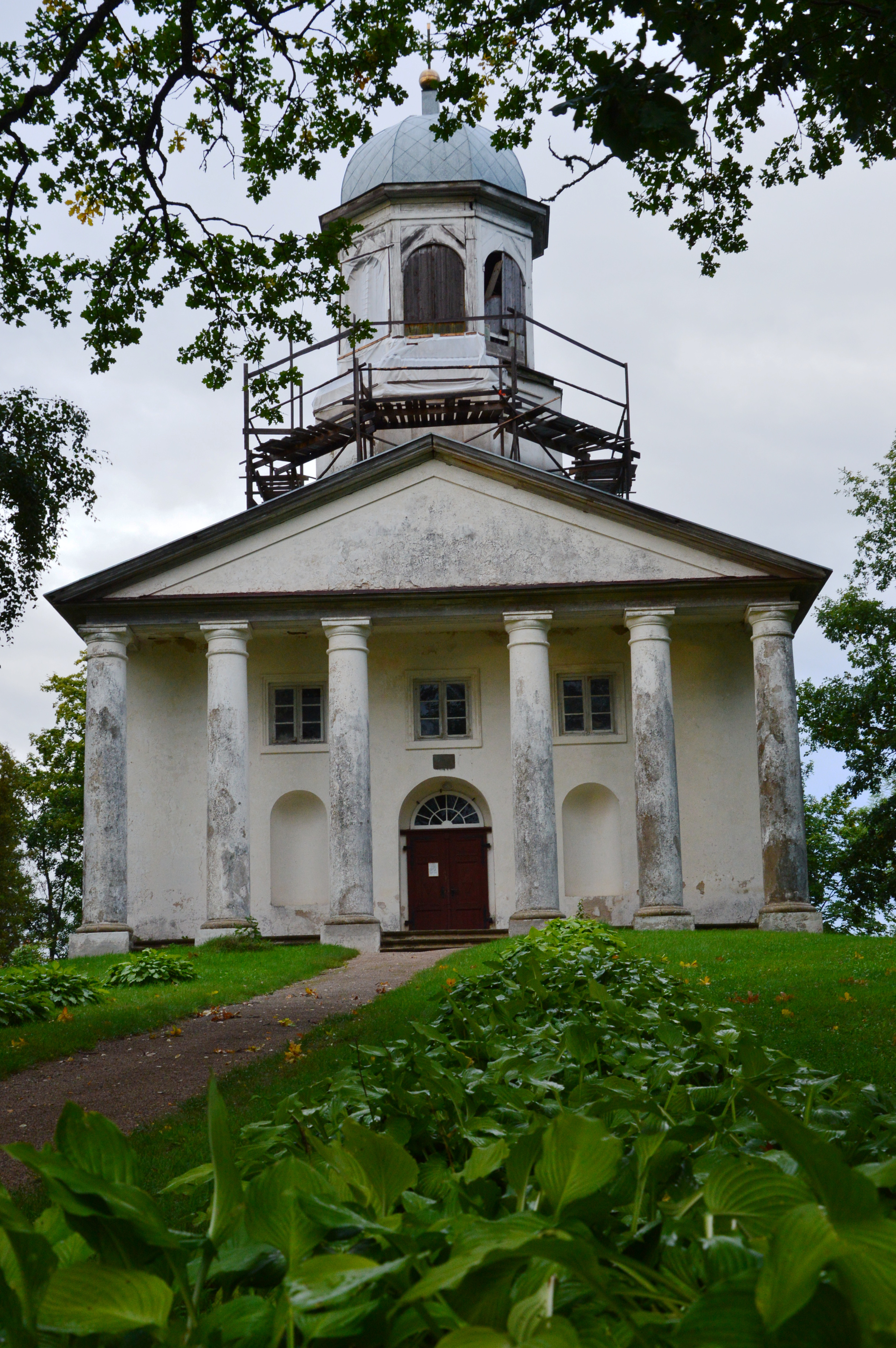 Dzērbene kirik eestvaates